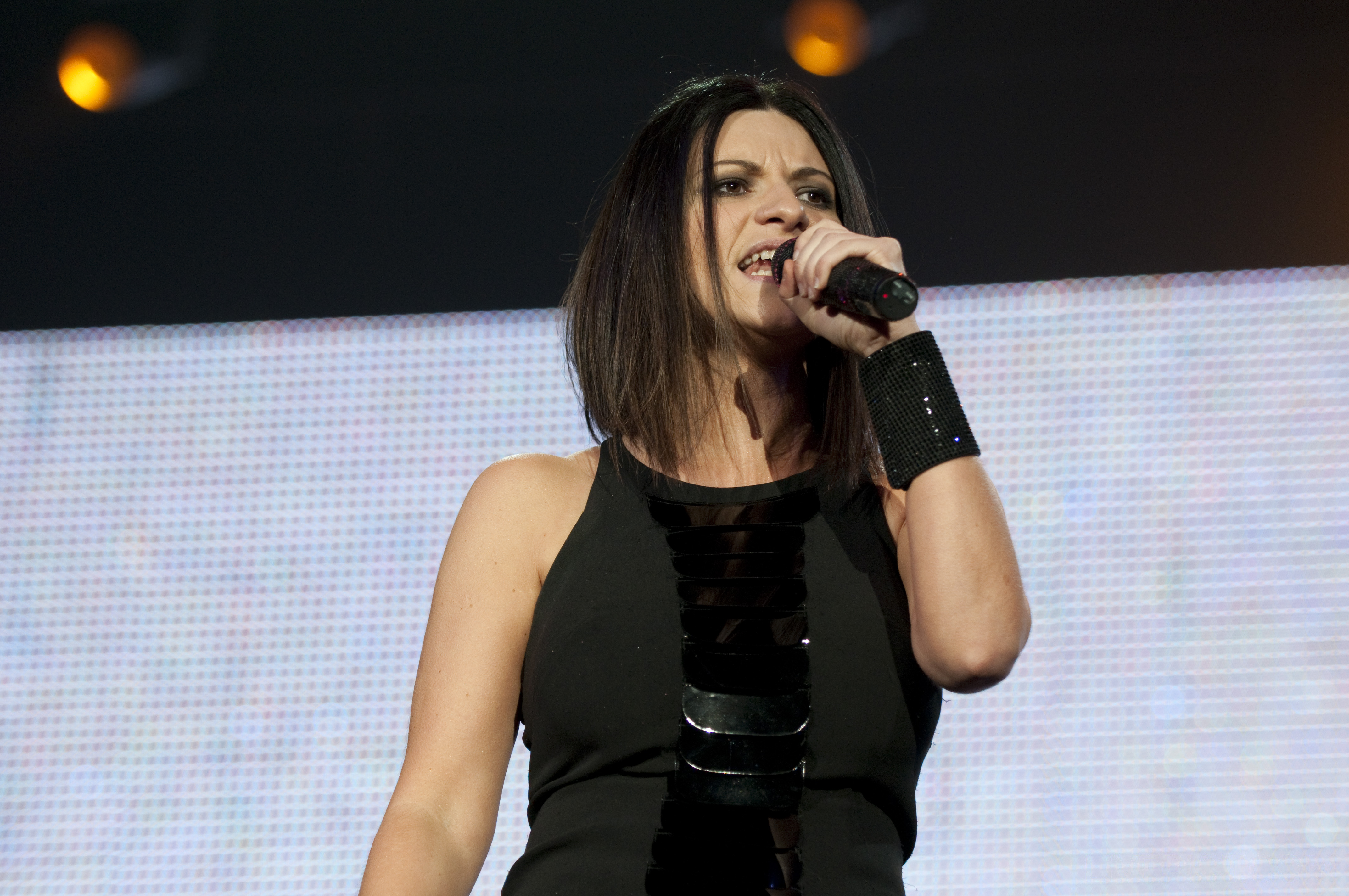 Laura Pausini